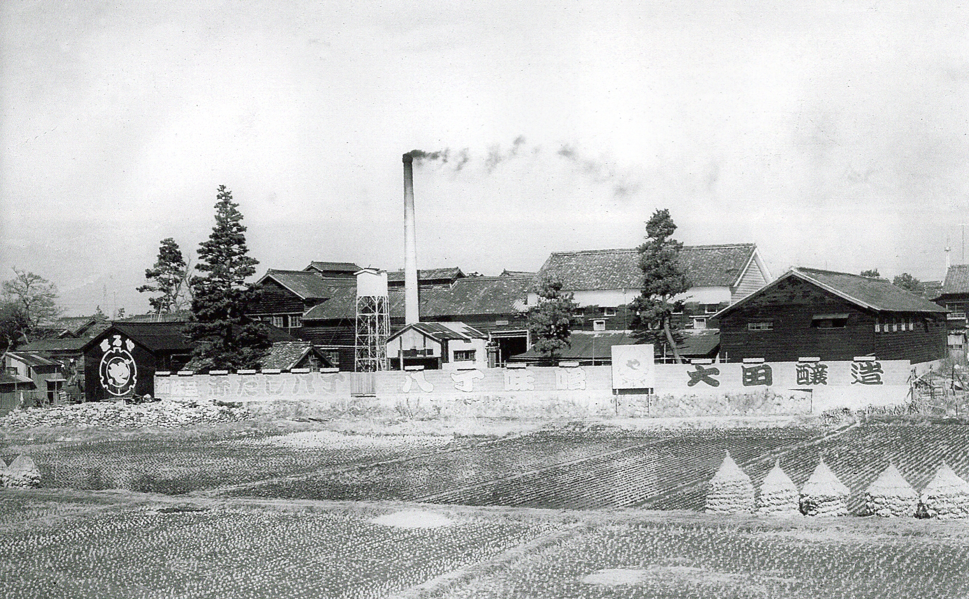 1920年代のまるや八丁味噌